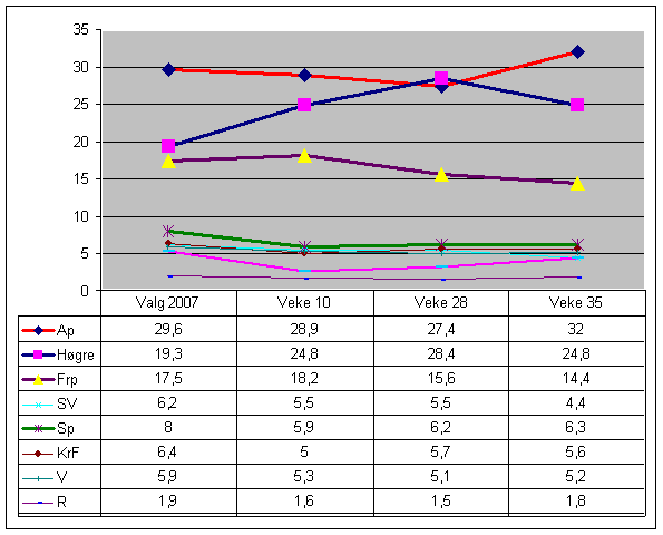 Meiningsmålingar henta frå Poll of polls